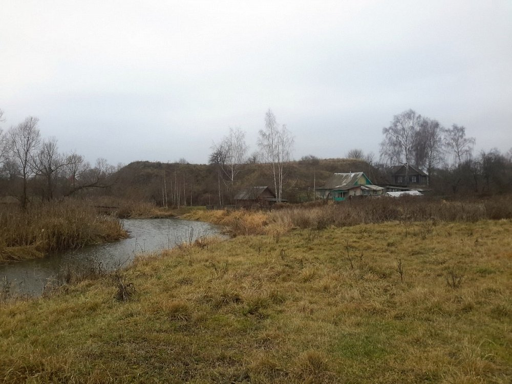 Лукомскае гарадзішча